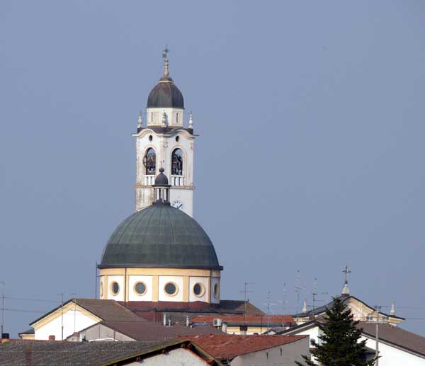 cupola e campanile della Chiesa Parrocchiale di Rosegaferro